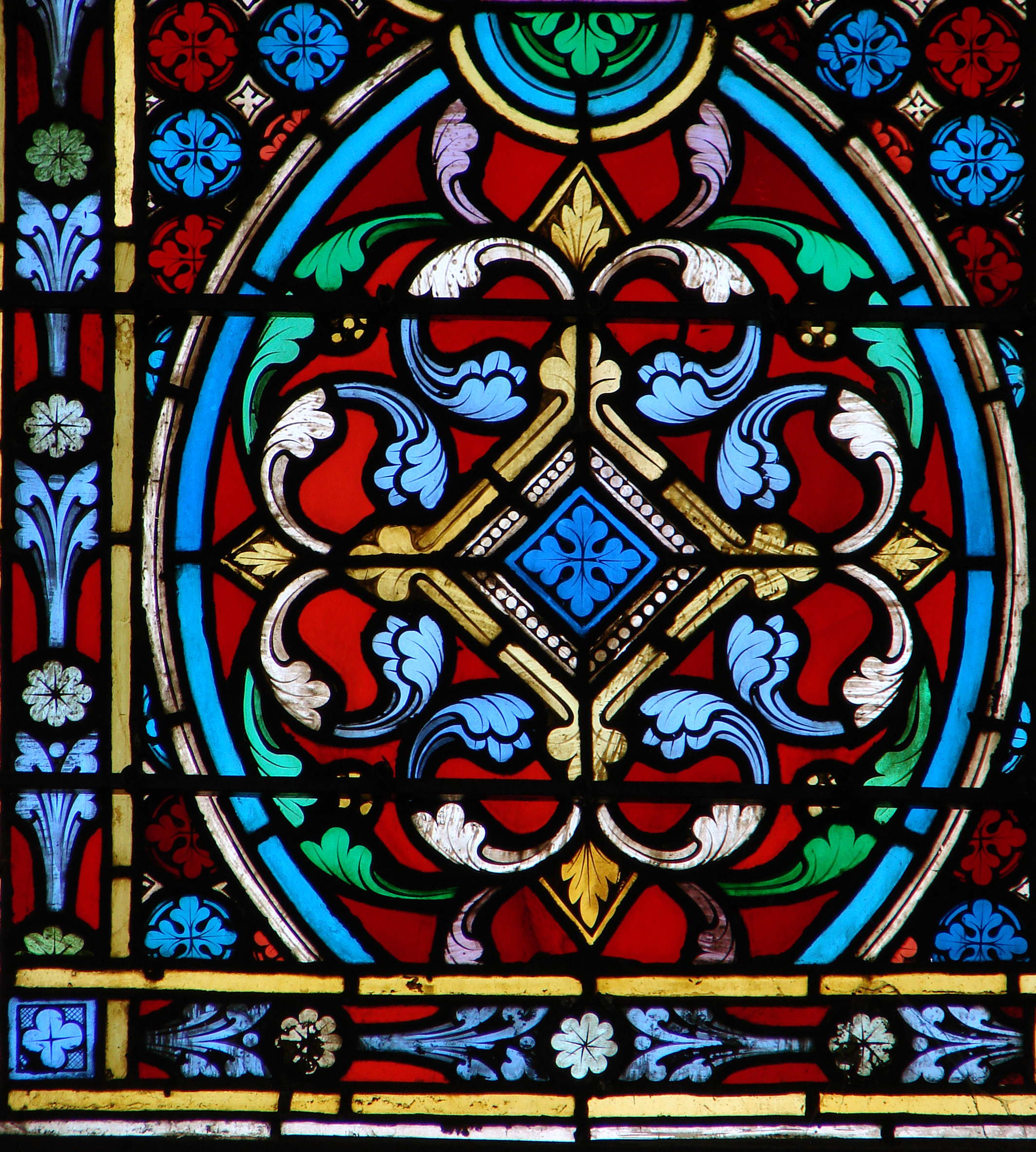 Détail d'un vitrail néogothique de la cathédrale de Meaux, daté de 1867.